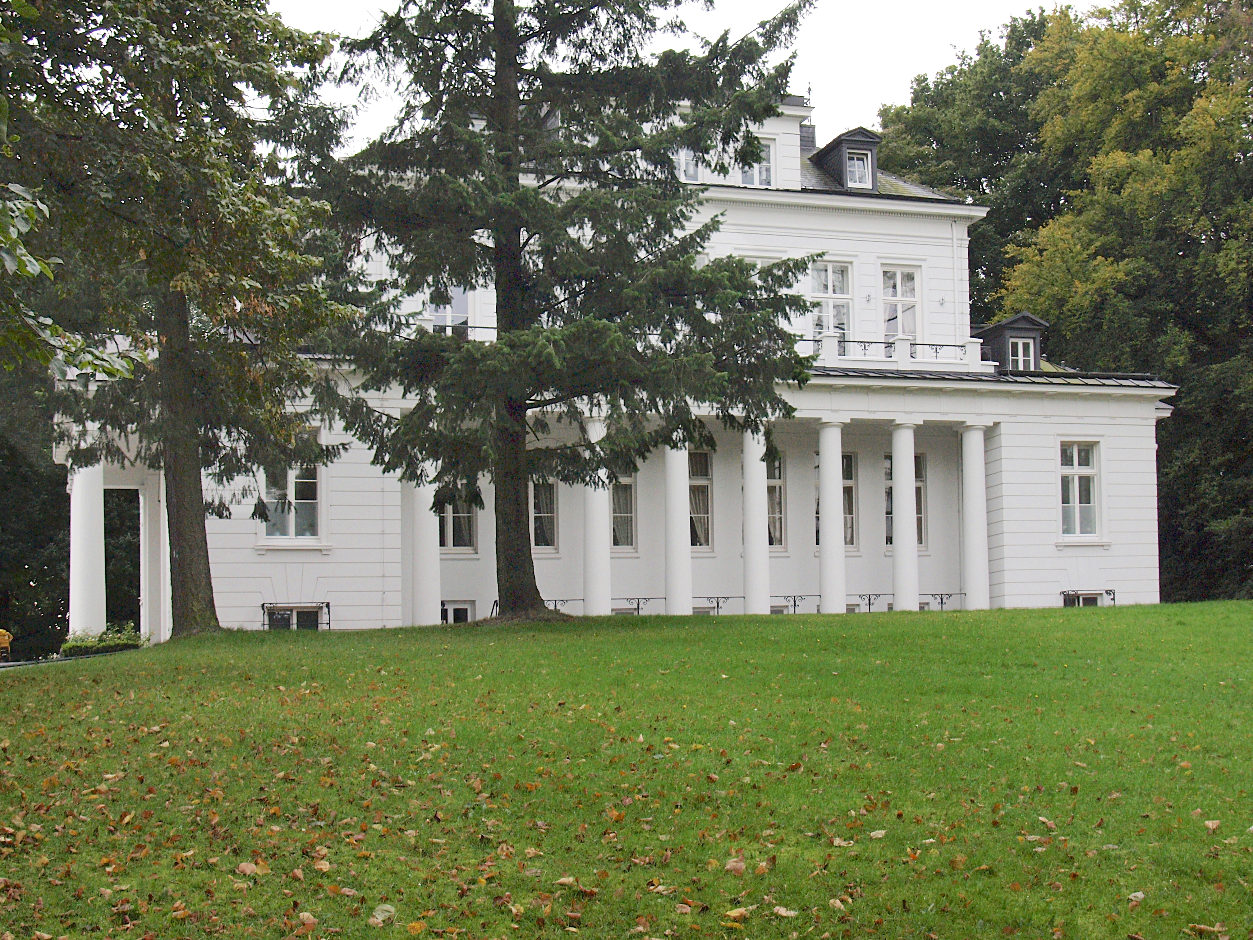 Herrenhaus Goßlers Park: Ursprünglicher Bau: Langgestreckter Putzbau auf rechteckigem Grundriss, eingeschossig, streng symmetrische Gliederung der Fronten. An den Schmalseiten vorgelagerter Säulenportikus. An den Längsseiten Säulenloggia. Erbaut 1794/95 von C. F. Hansen. Der heutige Bau aus Umbauten (Aufstockung, Terrassen, Balkonaufbauten) zwischen 1897 und 1901 entstanden.This is a photograph of an architectural monument.